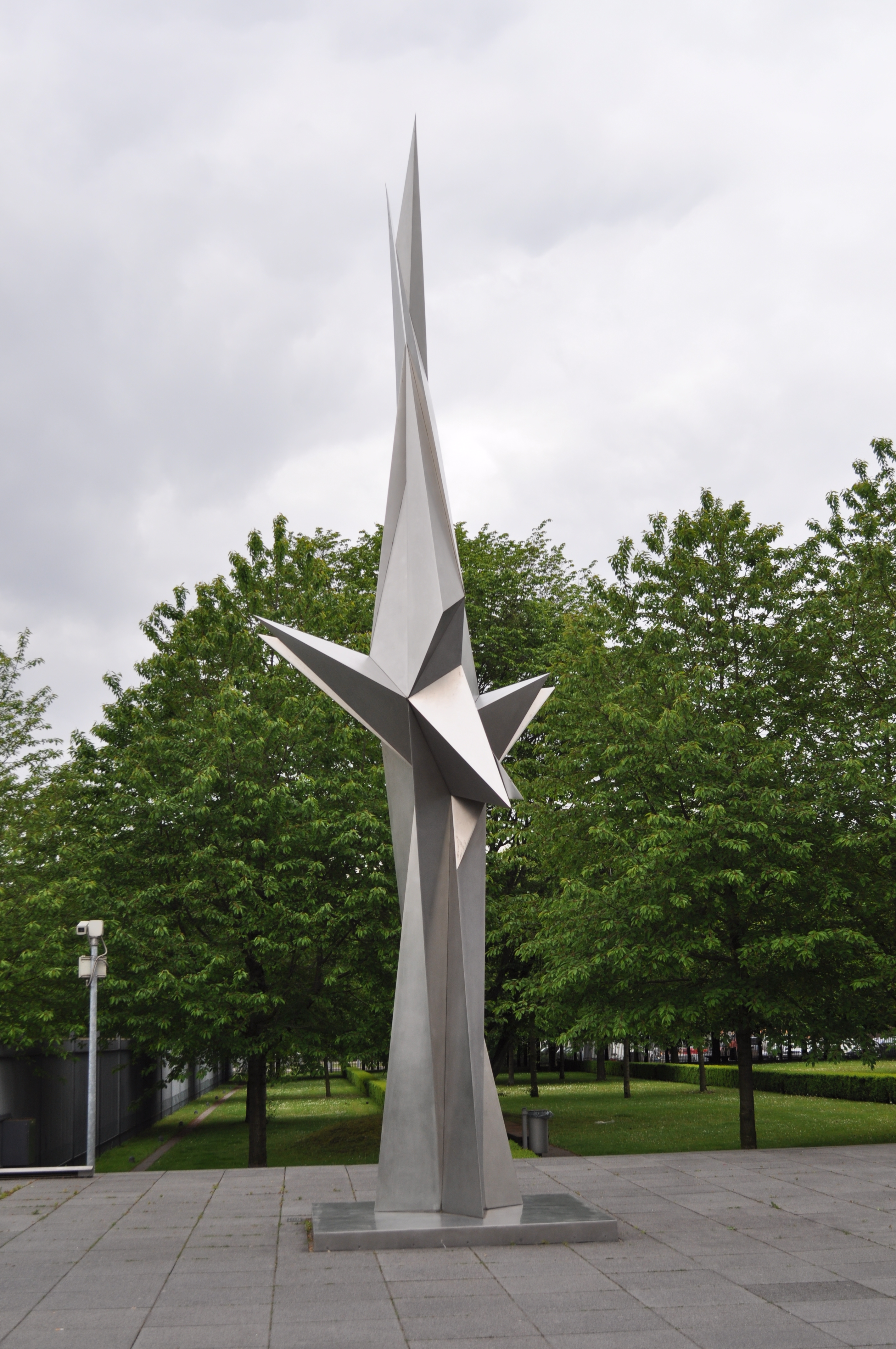 Skulptur von Erich Hauser vor dem Geldmuseum der Deutschen Bundesbank in Frankfurt am Main. Die Skulptur trägt die Nummer 4/96 und stammt aus dem Jahr 1996.